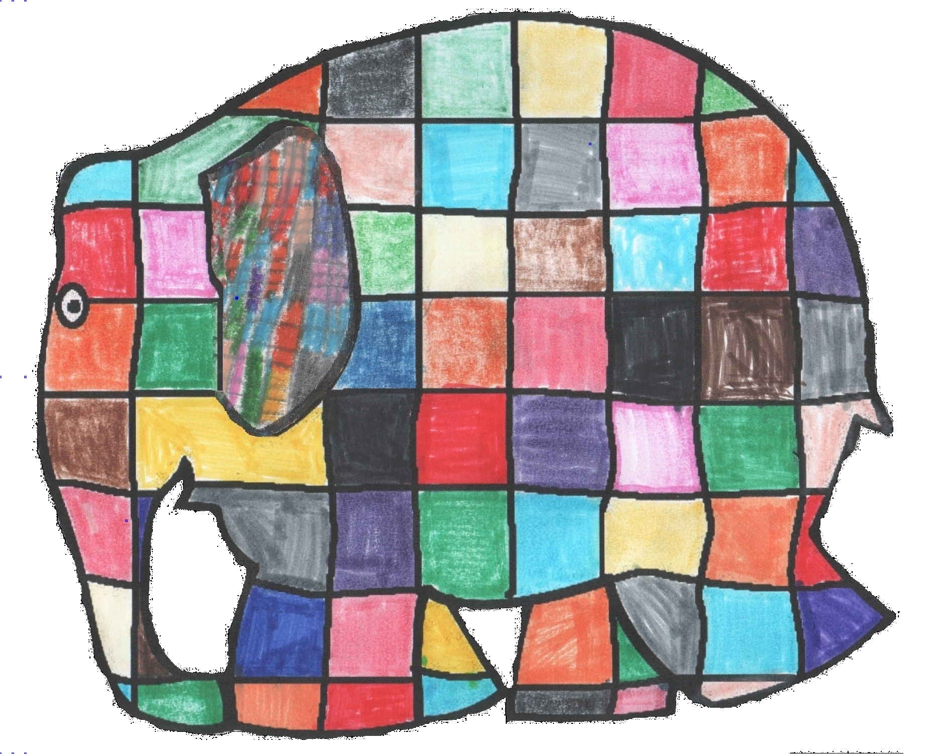 Possibilité d'enseigner le partage de l'information dès la 2ème année de maternelle par la question : « est-ce que je peux découper un morceau de ton dessin pour faire un patchwork ? »